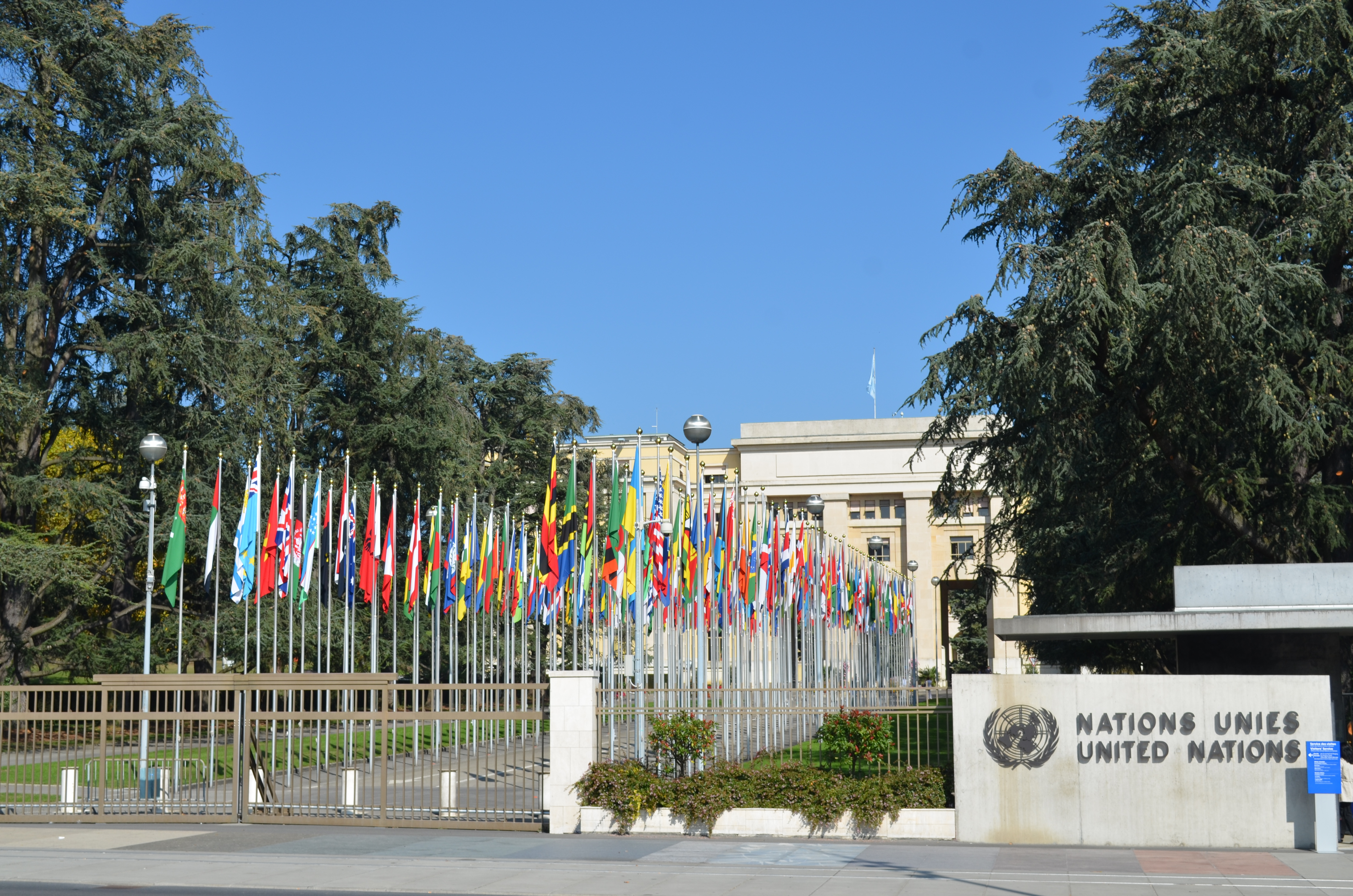 Allée des Nations